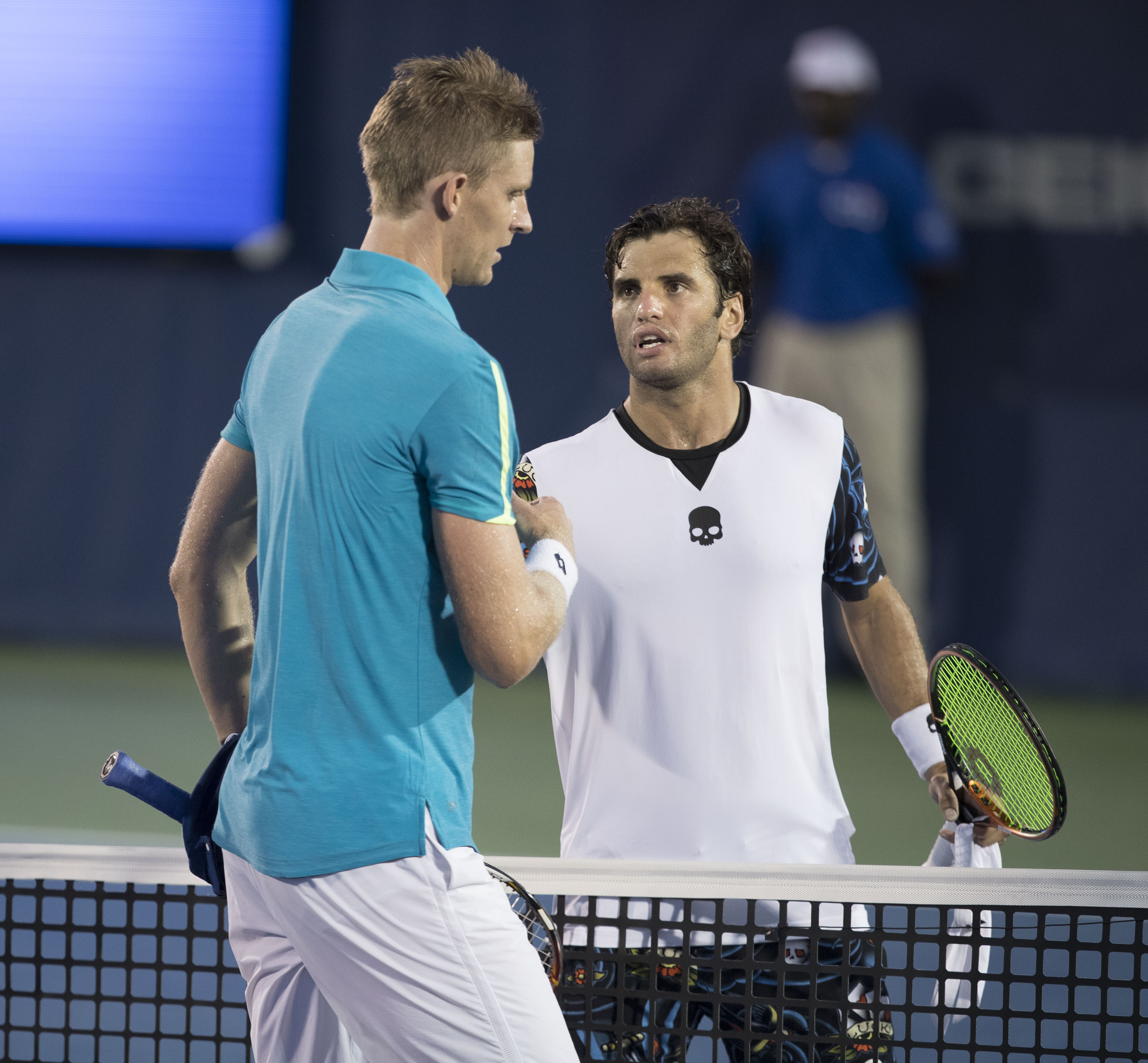 2016 Citi Open